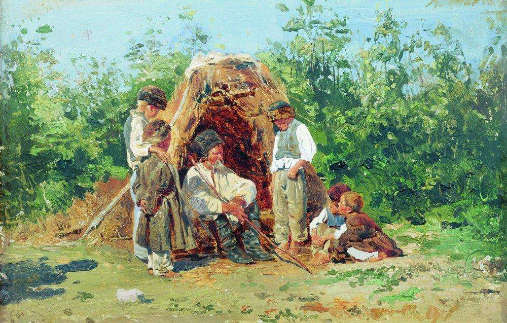 Рассказы деда. 1881